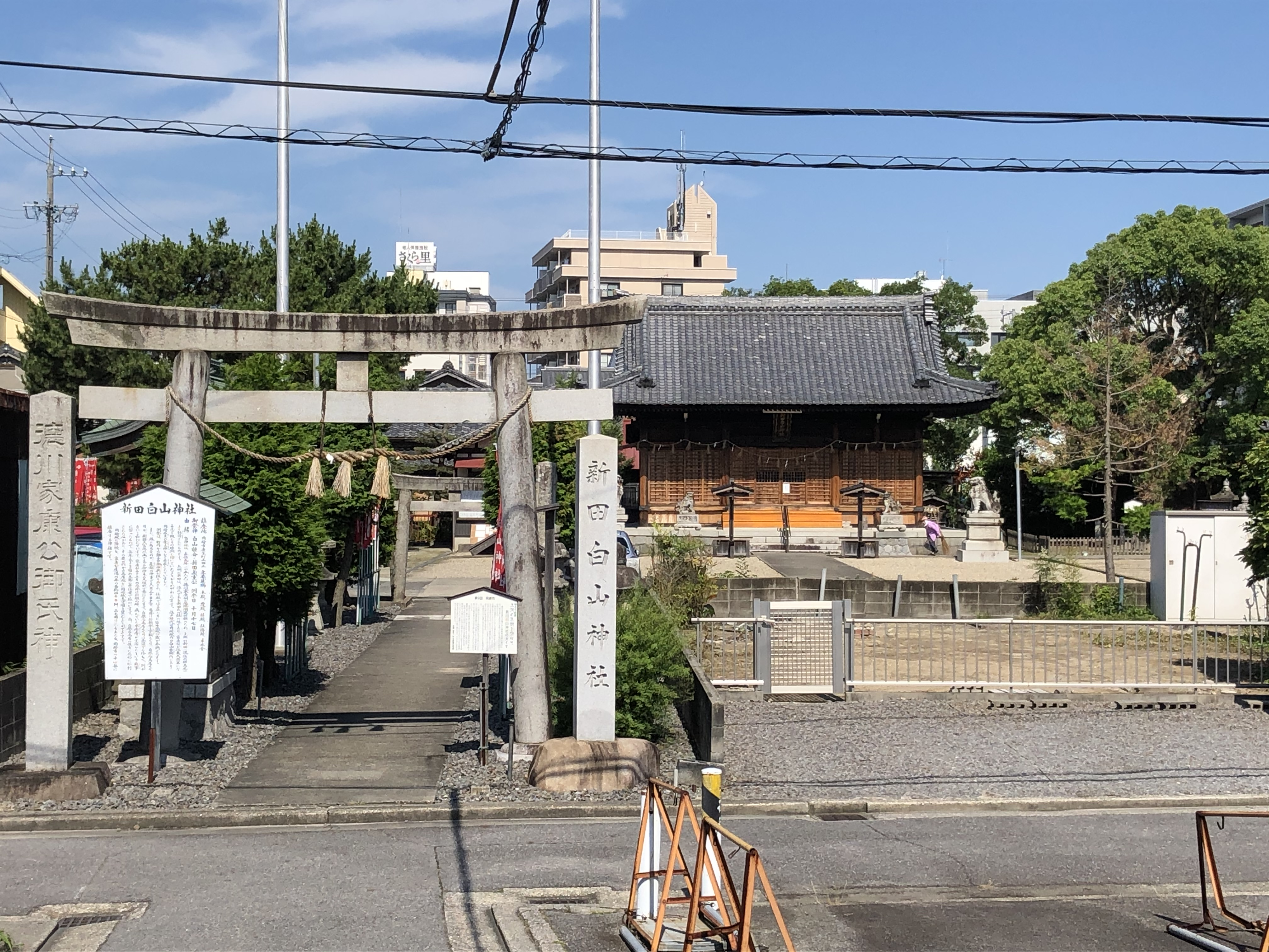 新田白山神社（岡崎市康生町）